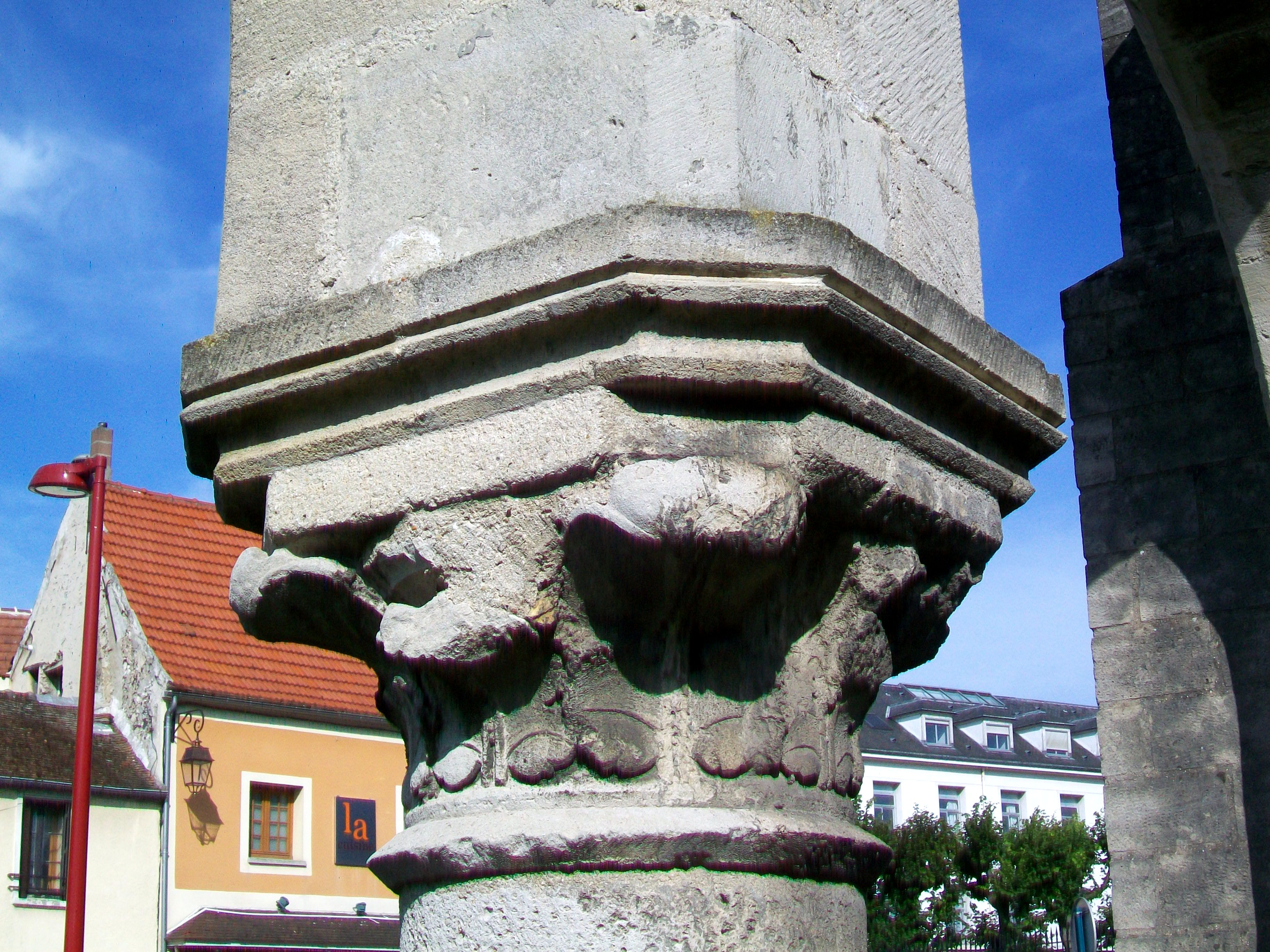 Le troisième des trois chapiteaux conservés (du sud vers le nord).